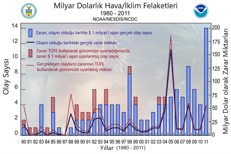 ABD'de şiddetli hava olayları 1980-2011